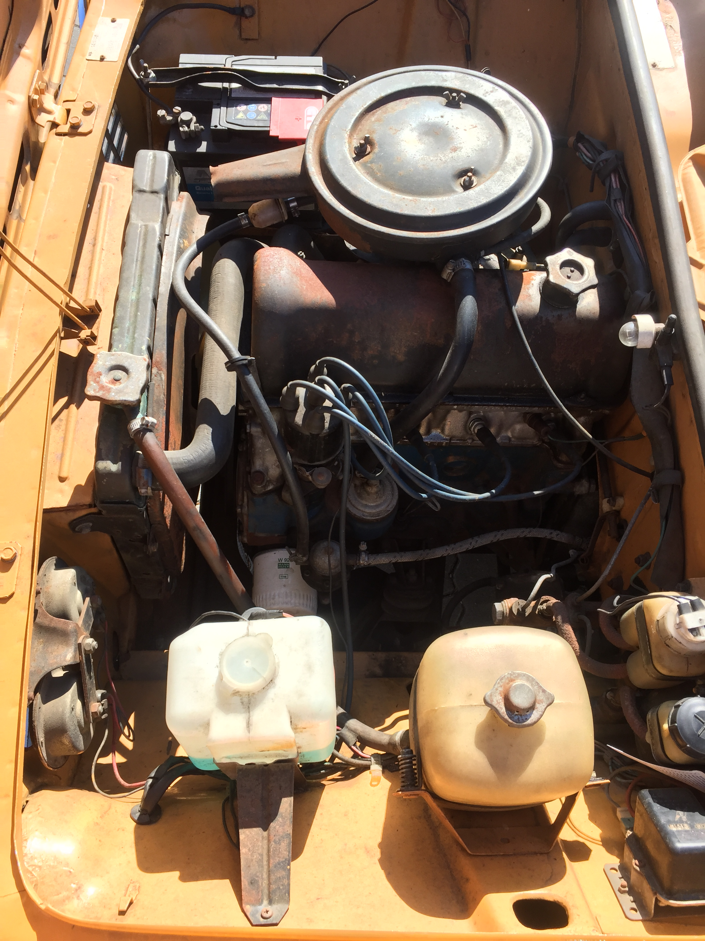 Shiguli (1979) Motorraum - Fiat 124 Lizenznachbau (aka Lada)